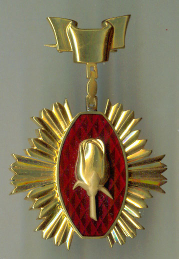 ORDER OF ROSE